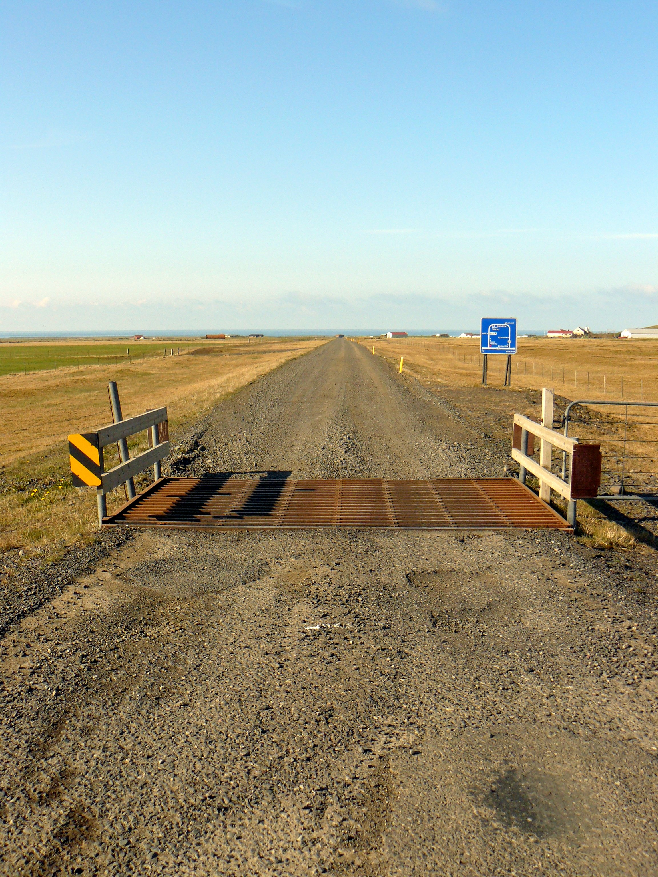 Barrière canadienne ("cattle grid") sur une route non asphaltée à Petursey, près de Vík í Mýrdal (Islande du Sud)